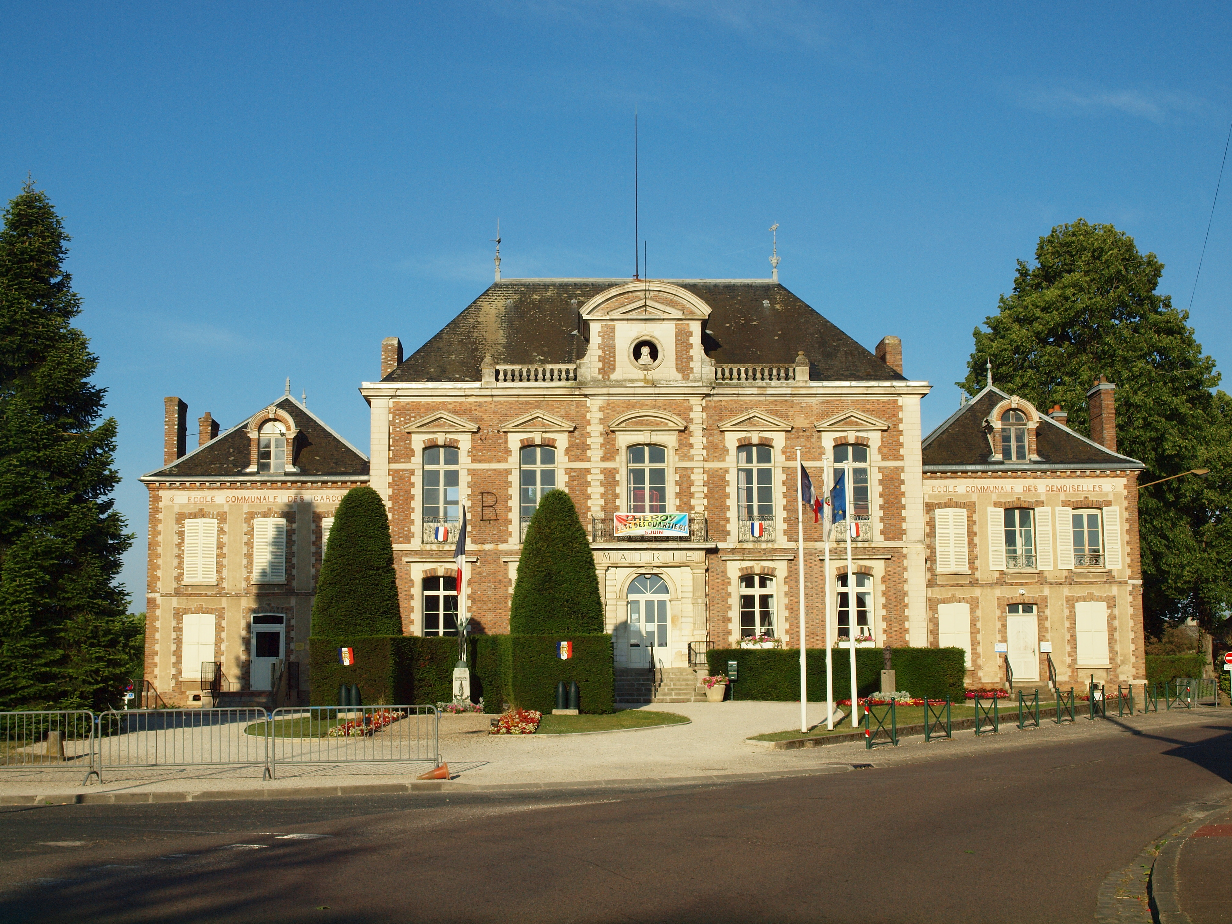 Chéroy (Yonne, France) , la mairie.